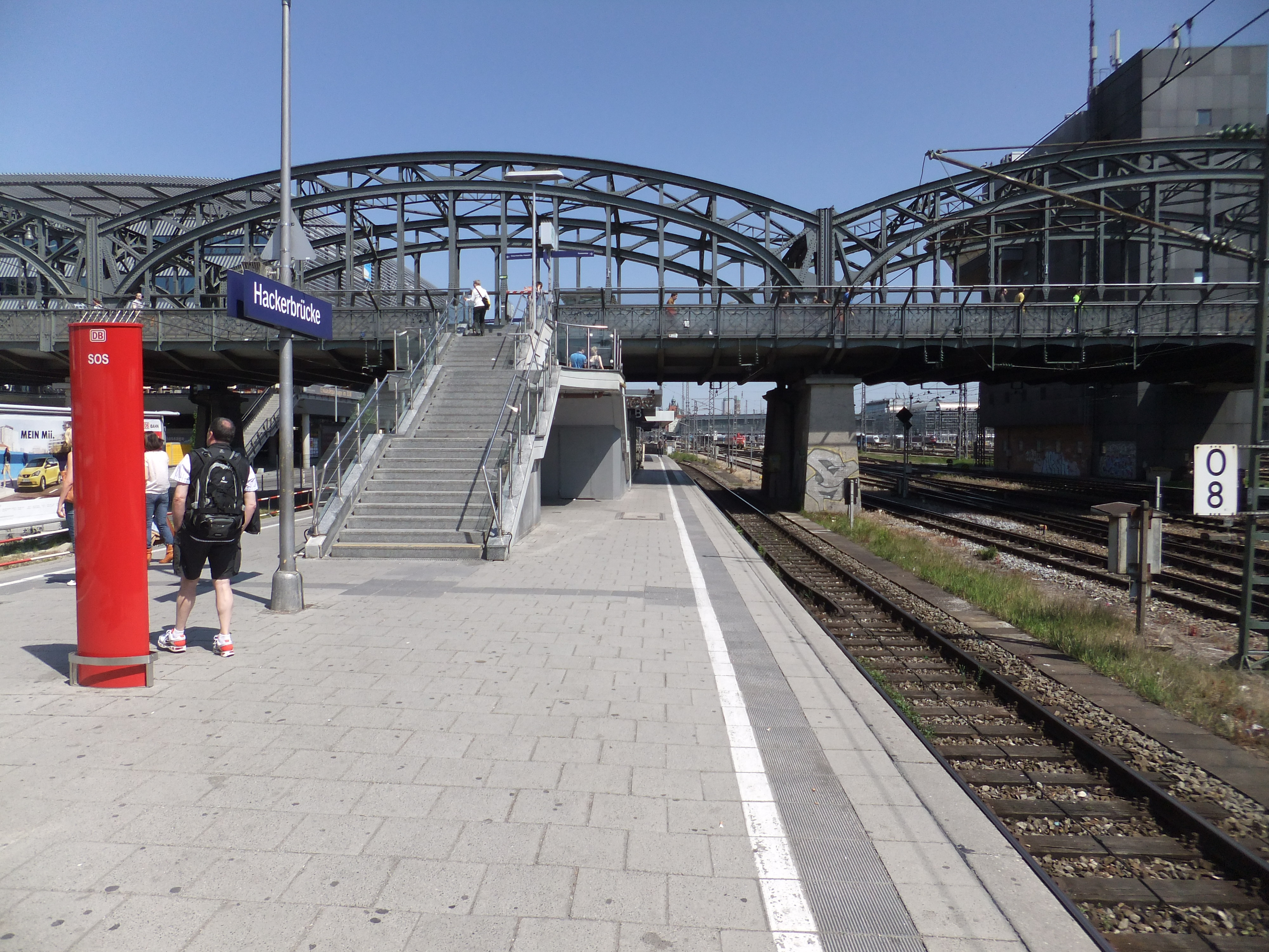 Die Bahnsteige des Bahnhofs München Hackerbrücke